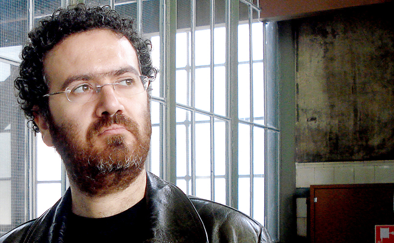 Cem Kiziltug illustrator istanbul